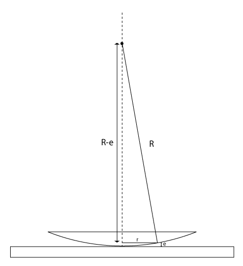 schema pour un exercice sur les anneaux de newton